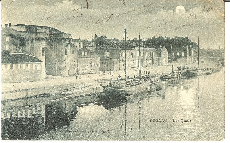 Gabarres au port de Cognac